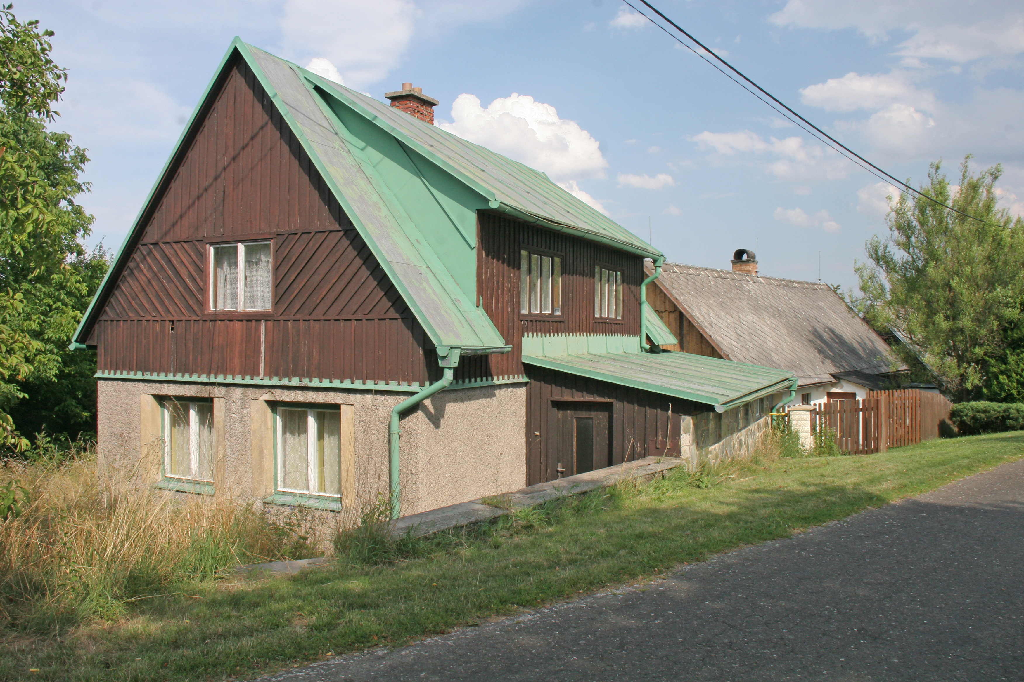 Zdobín čp. 22